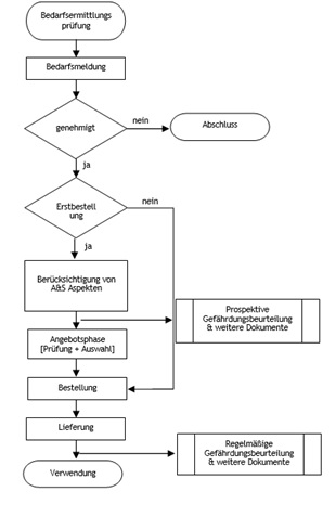 Integration des Arbeits- und Gesundheitsschutzes in den Prozess "Beschaffung"